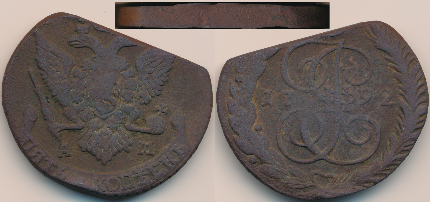 Пример монетного брака - край листа.